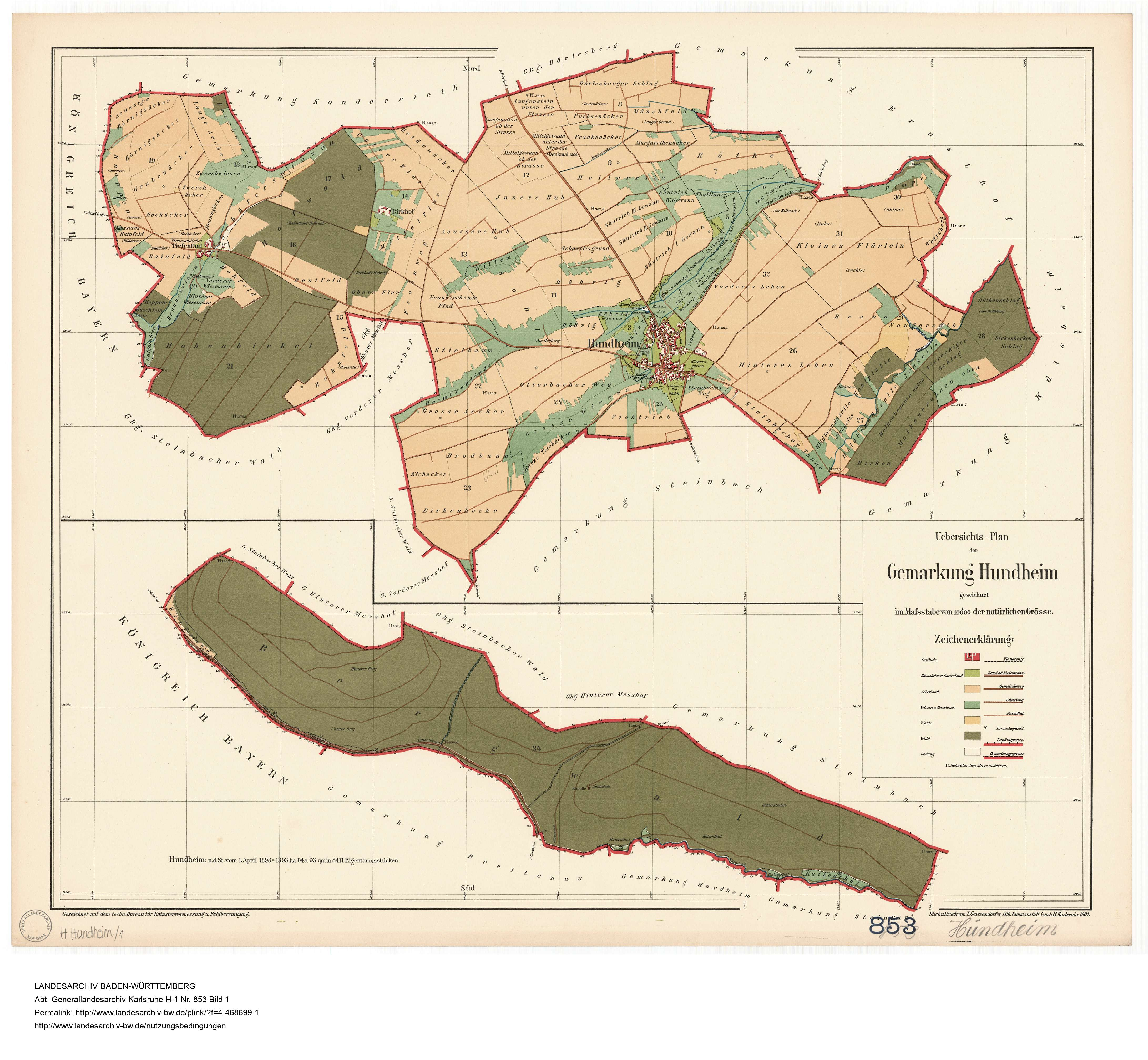 Gemarkungsplan Hundheim von 1898 (inkl. Tiefental(er Hof) und Birkhof